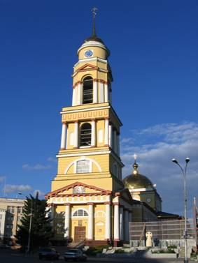 Христорождественский собор в Липецке